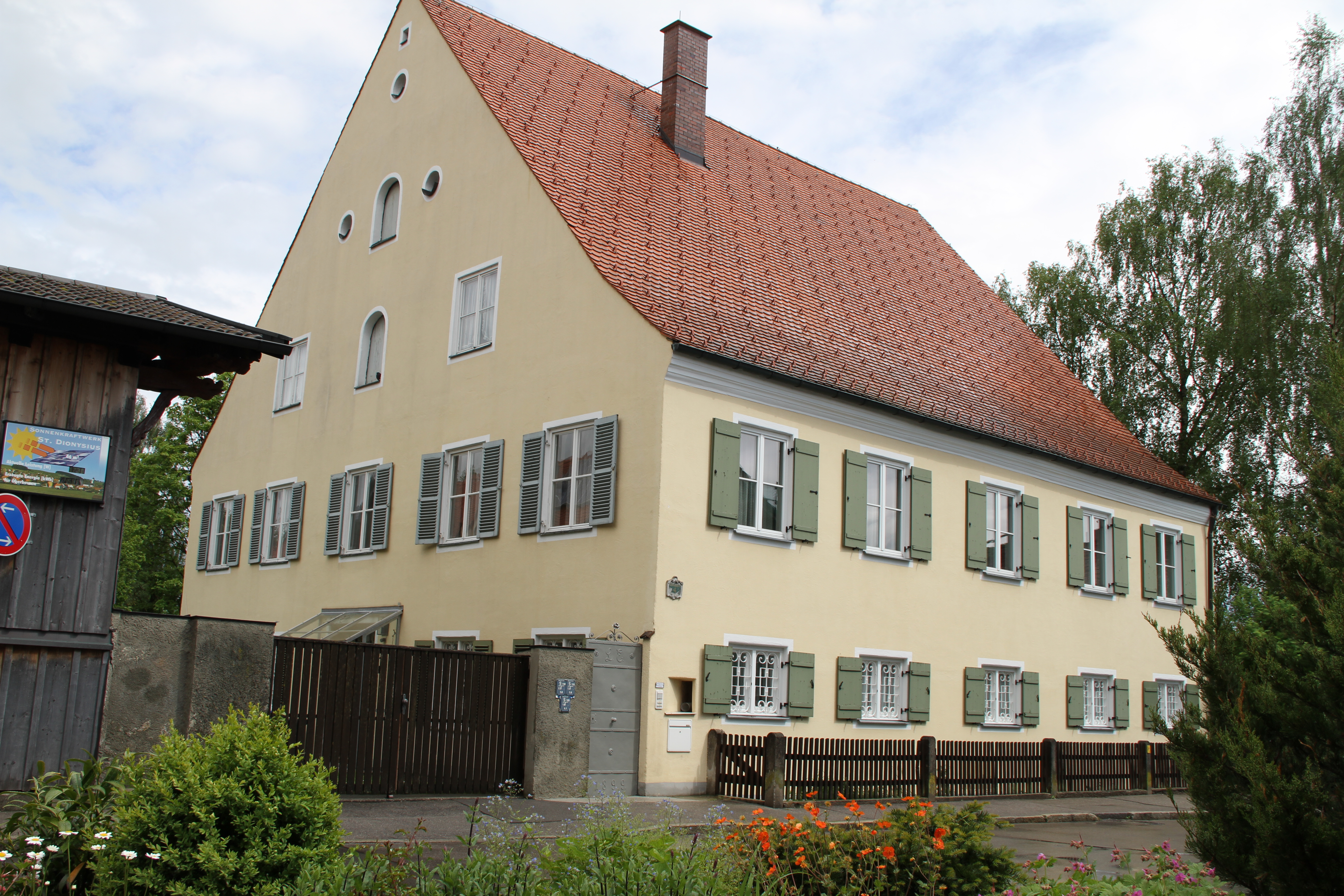 Das Pfarrhaus in Oberbeuren.